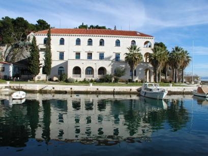 Ozeanographisches Institut und Ozeanographische Fakultät der Universität Split